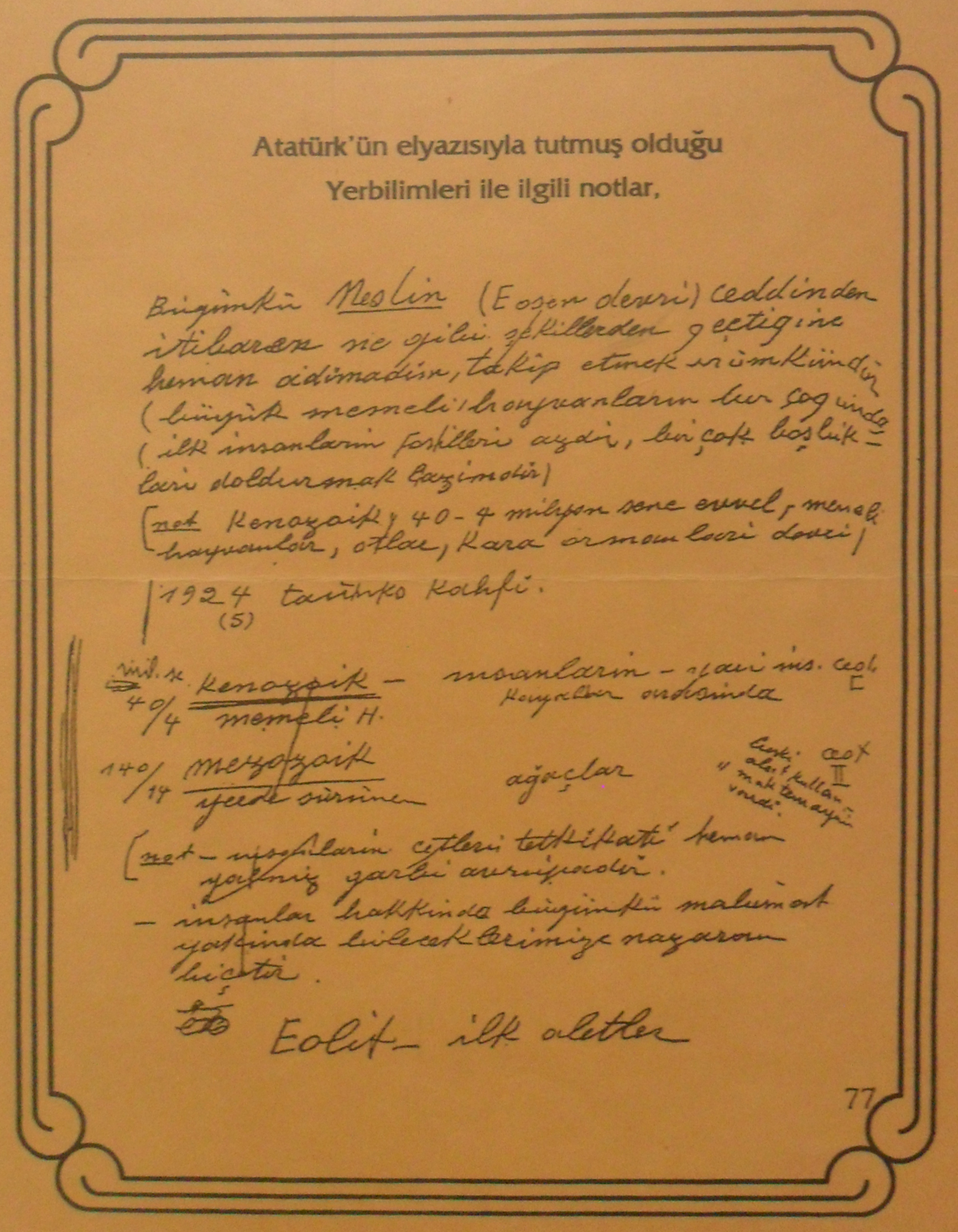 Mersin Deniz Müzesinde sergilenmekte olan, Mustafa Kemal Atatürk'ün kendi el yazısıyla aldığı yer bilimi (jeoloji) notları.